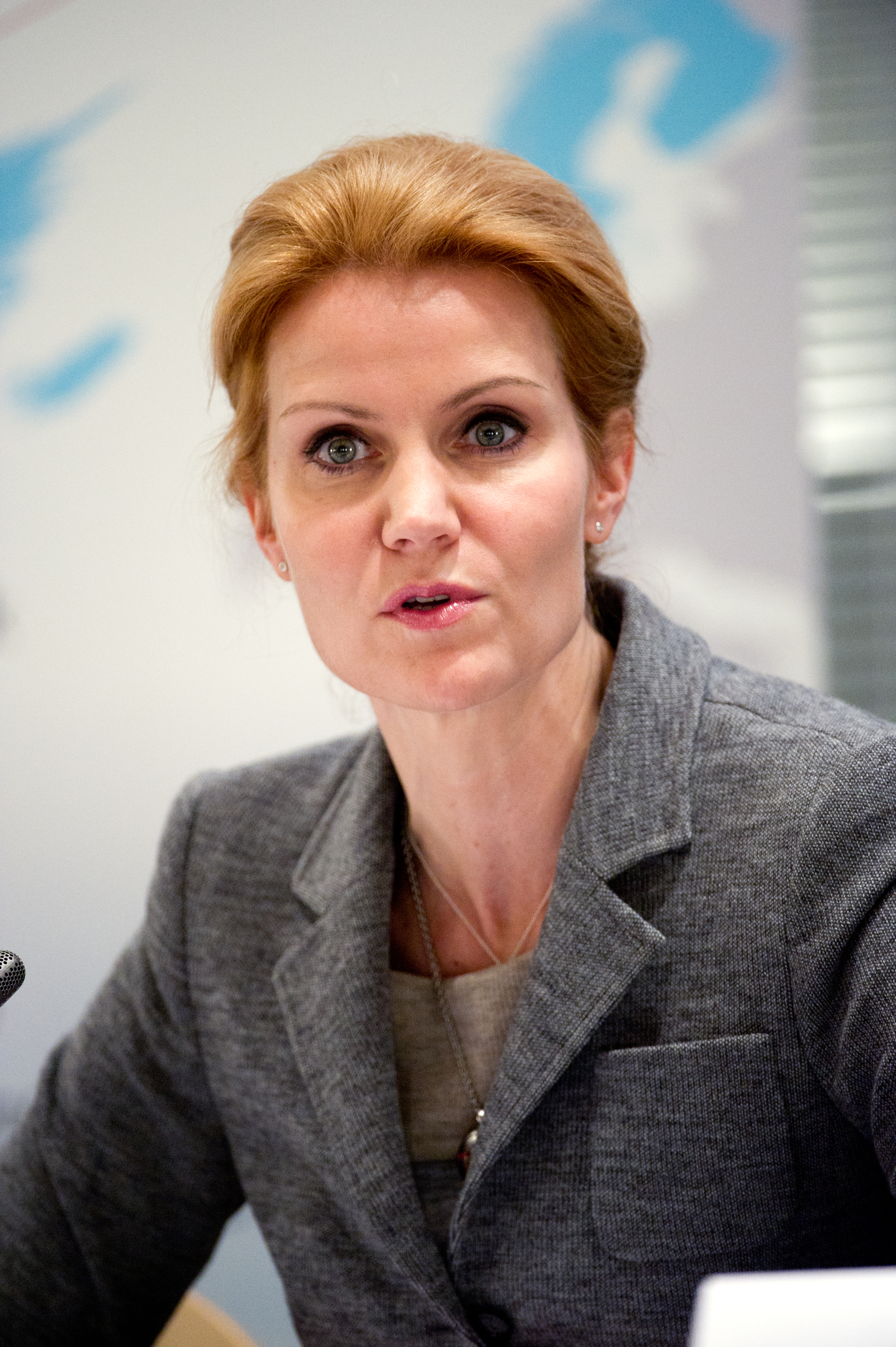 Danmarks statsminister Helle Thorning-Schmidt. Nordiska rådets session i Köpenhamn 2011.